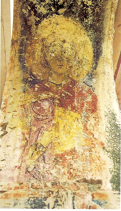 Фреска от Базиликата на оглашените в Сервия, Гърция.